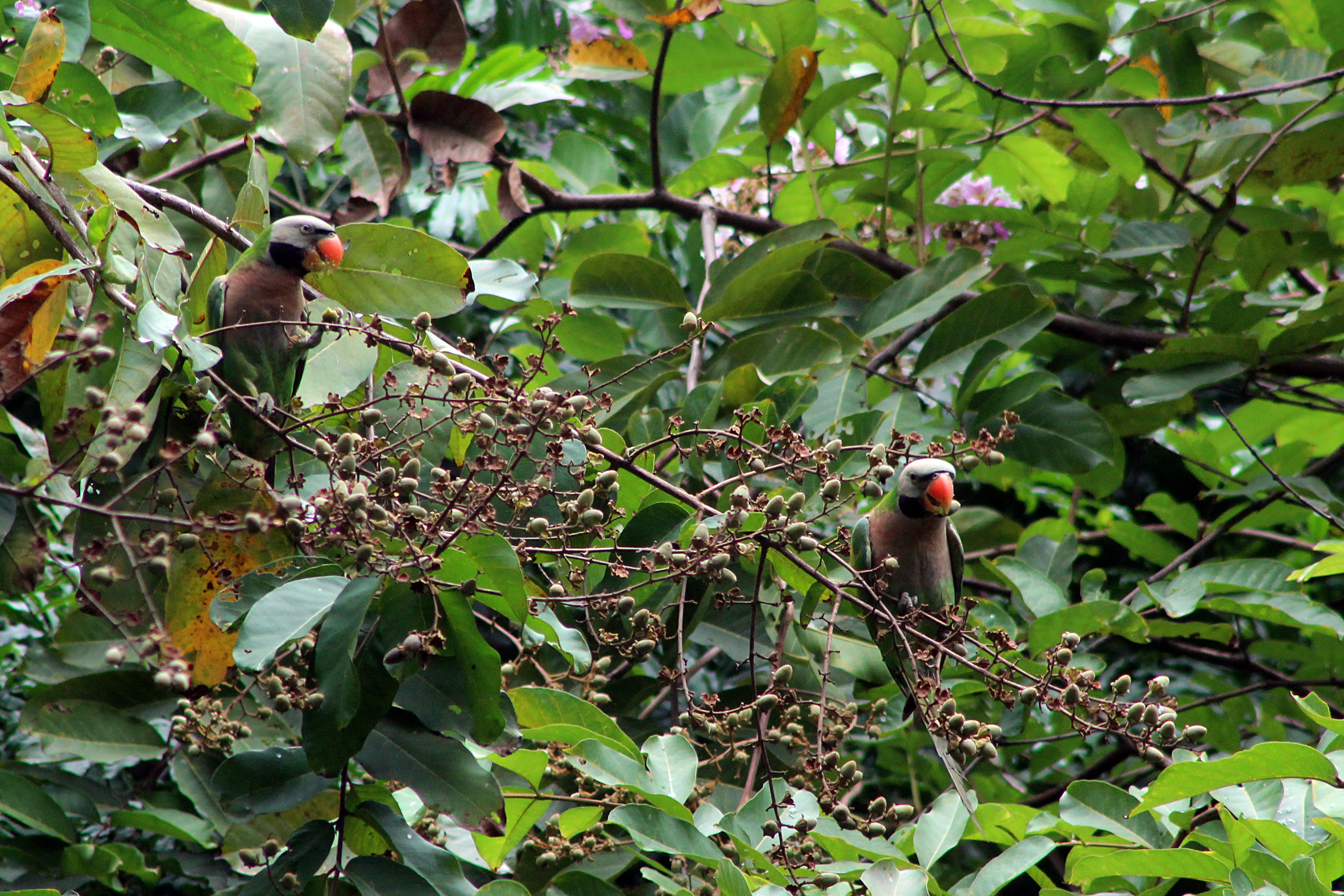 Betet biasa (Psittacula alexandri) memakan biji bungur (Lagerstroemia speciosa) sebagai sumber pakannya.